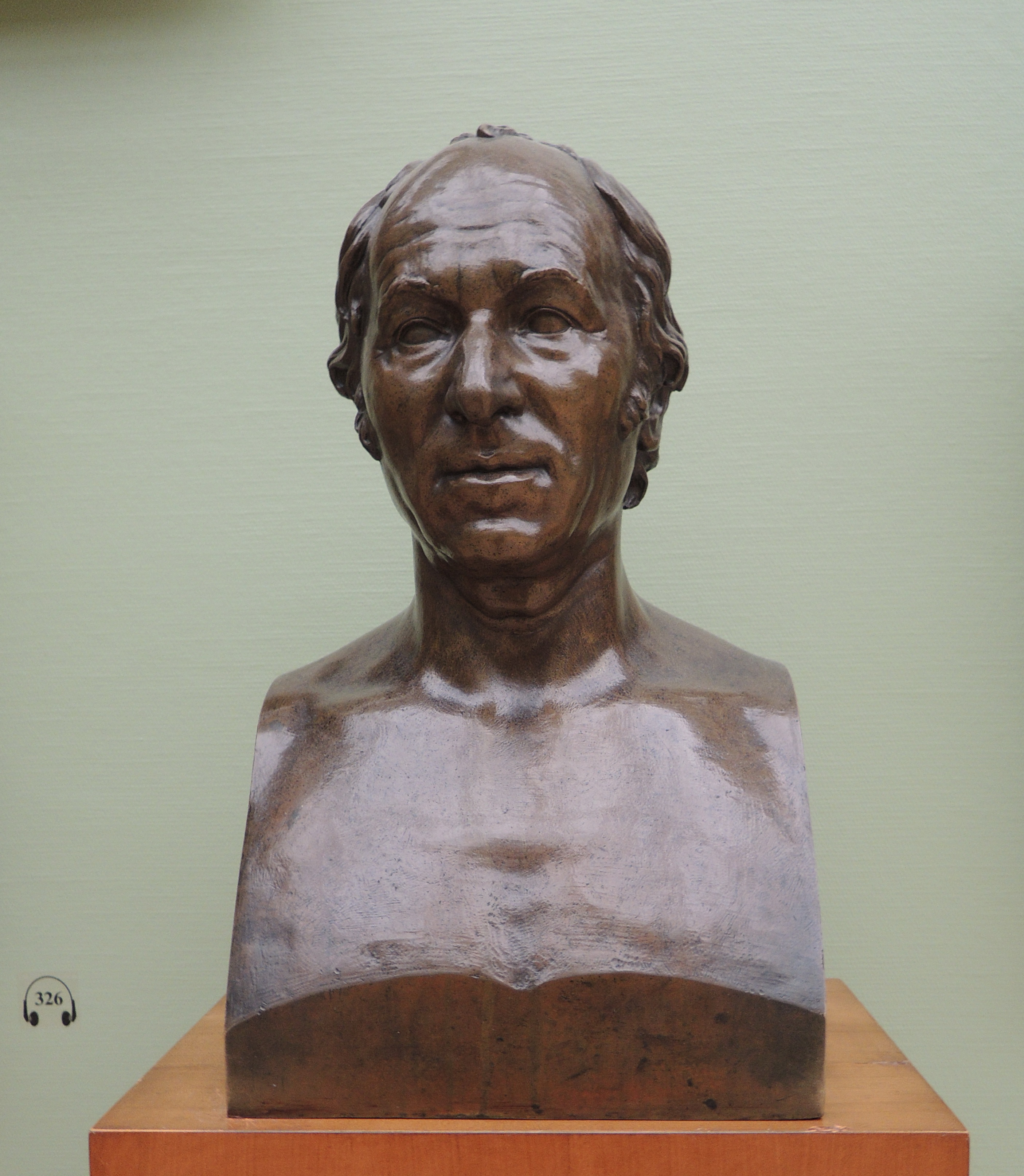 С. (Ф.) И. Гальберг (1787-1839). "Портрет скульптора И.П. Мартоса", 1837. ГТГ. Бронза. Дар Н.Ф. Крашенниникова, внука И.П. Мартоса